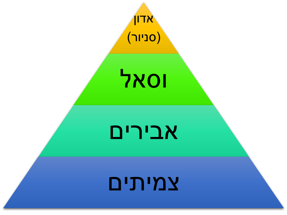 תרשים המציג את התפקידים באחוזה הפיאודלית לפי מעמדם